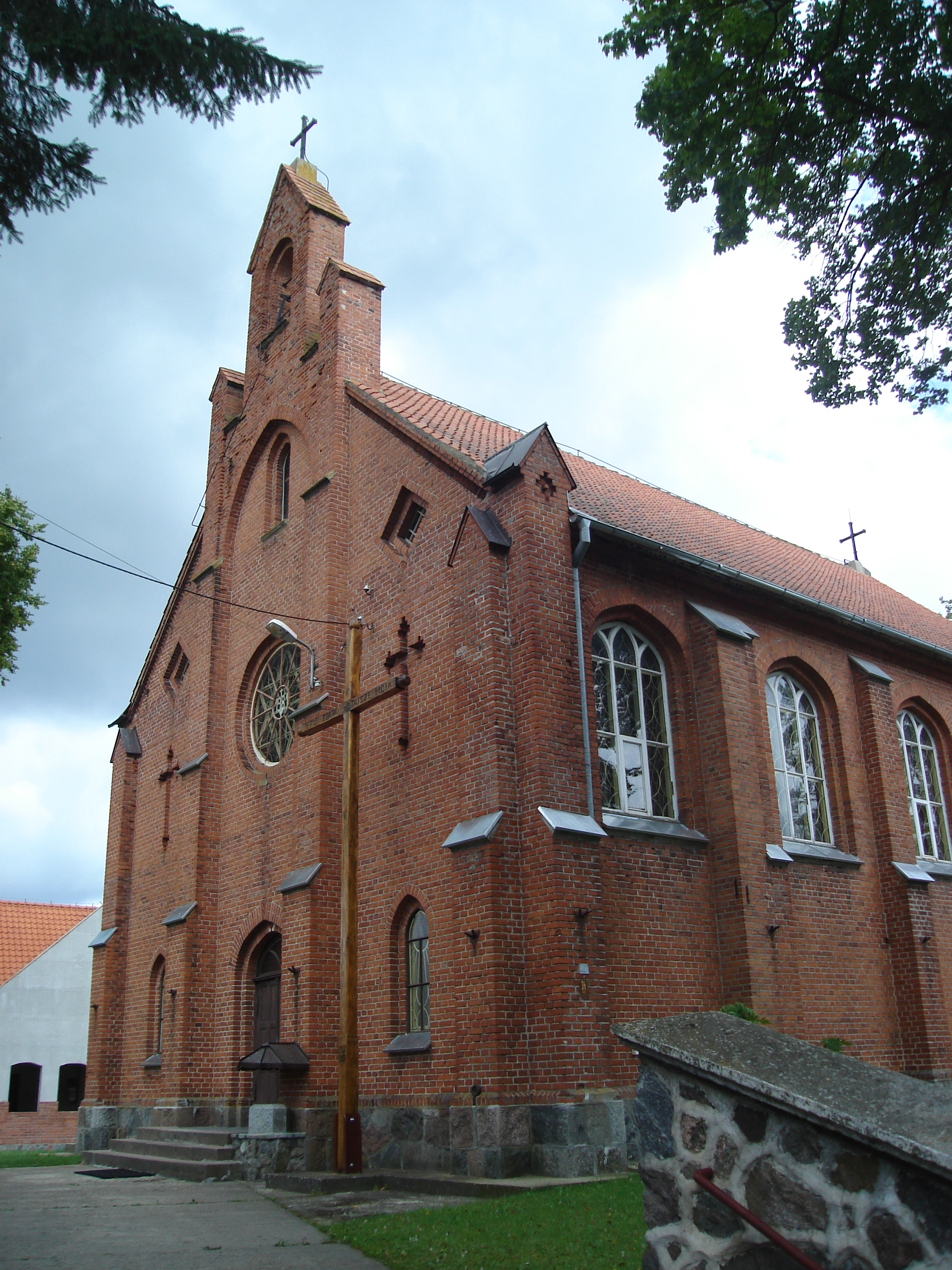 Kościół pw. Podwyższenia Krzyża Świętego w Ukcie